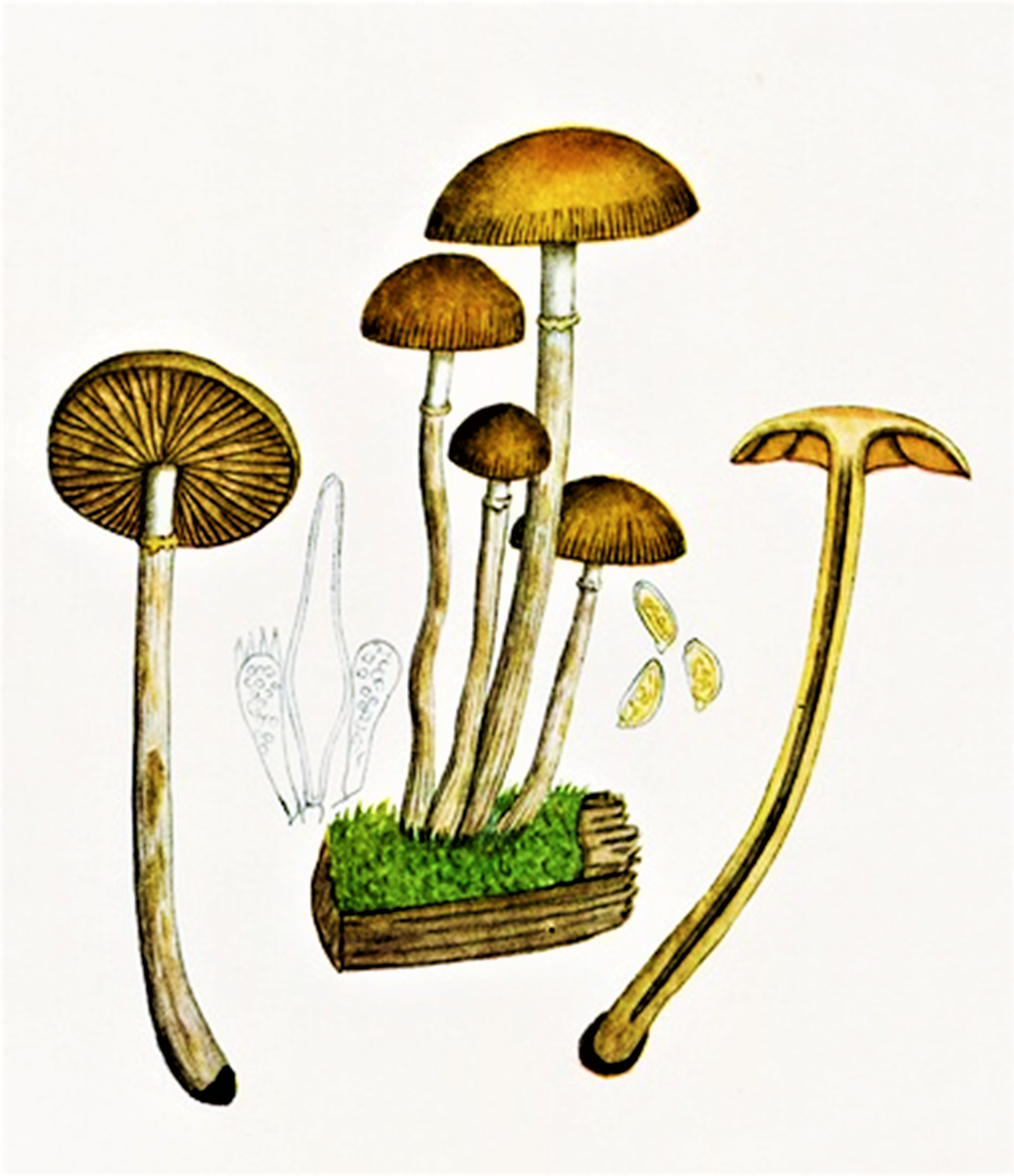 Bres.: Pholiota marginata (Batsch, 1789), heute Galerina marginata (Batsch) Quél. (1872)